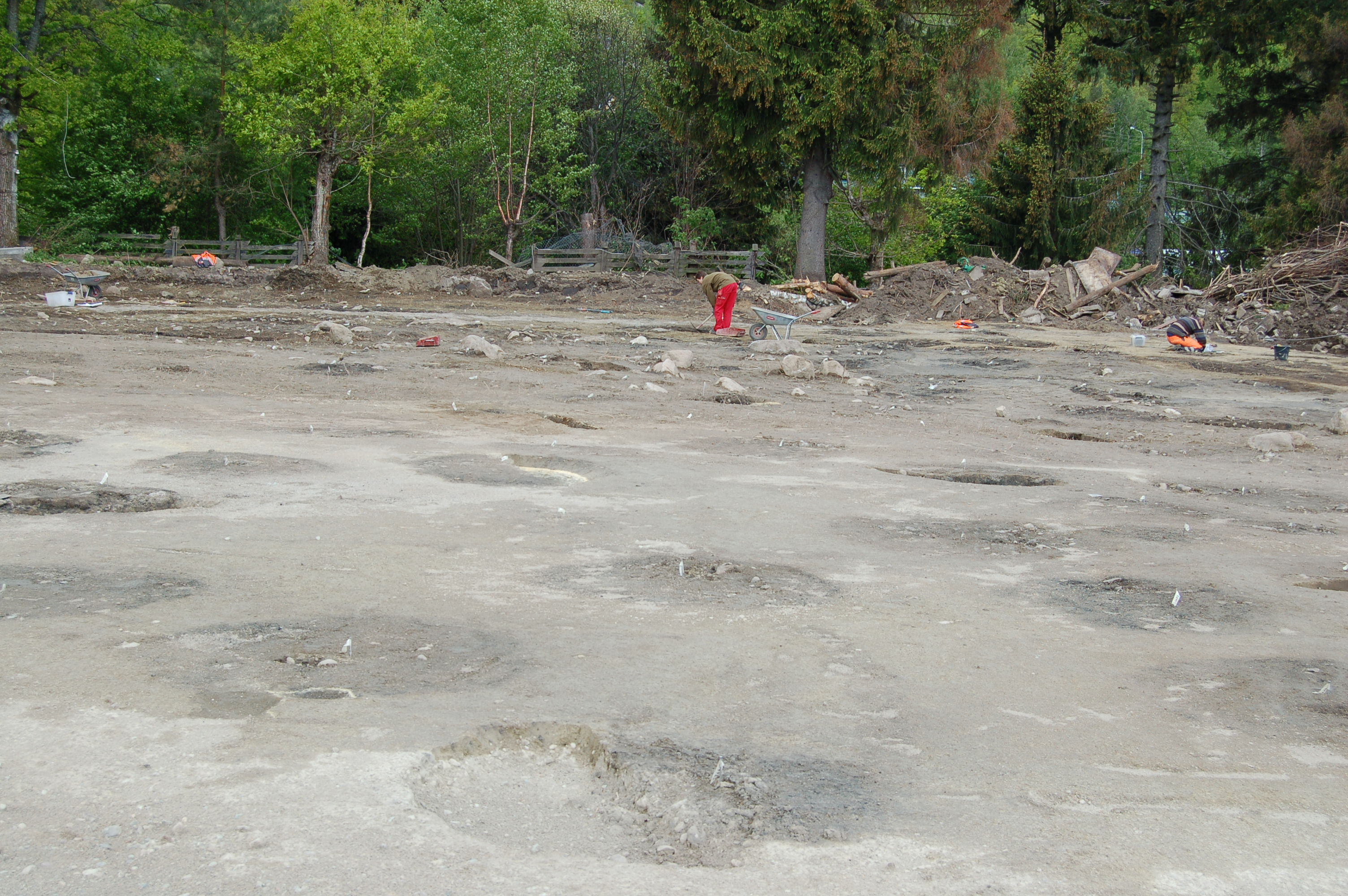 Kokegroper Bommestad (ved Numedalslågen) i Larvik - utgraving før ny E18.